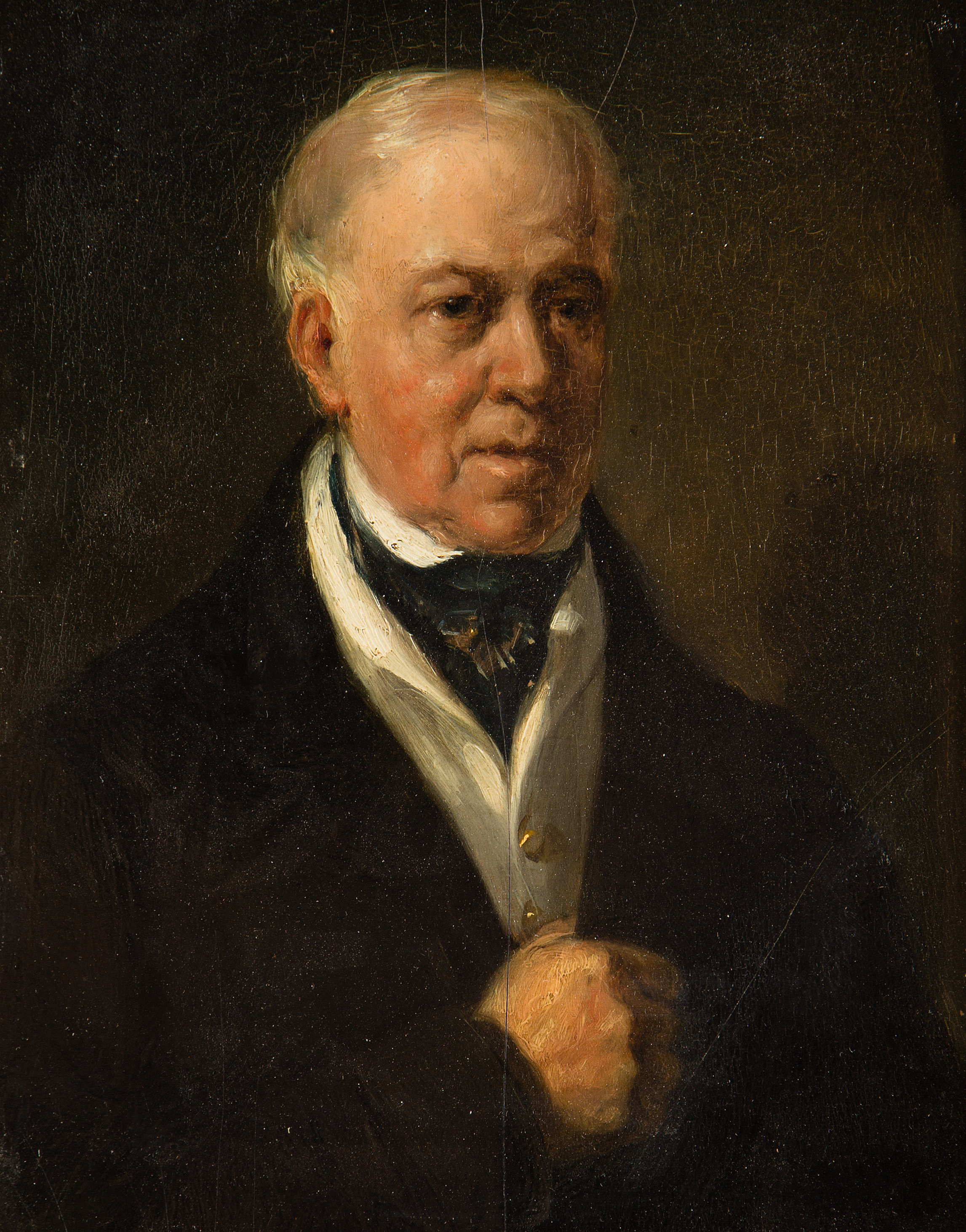 Självporträtt av målaren Sir William Allan (1782-1850), daterad 1848.